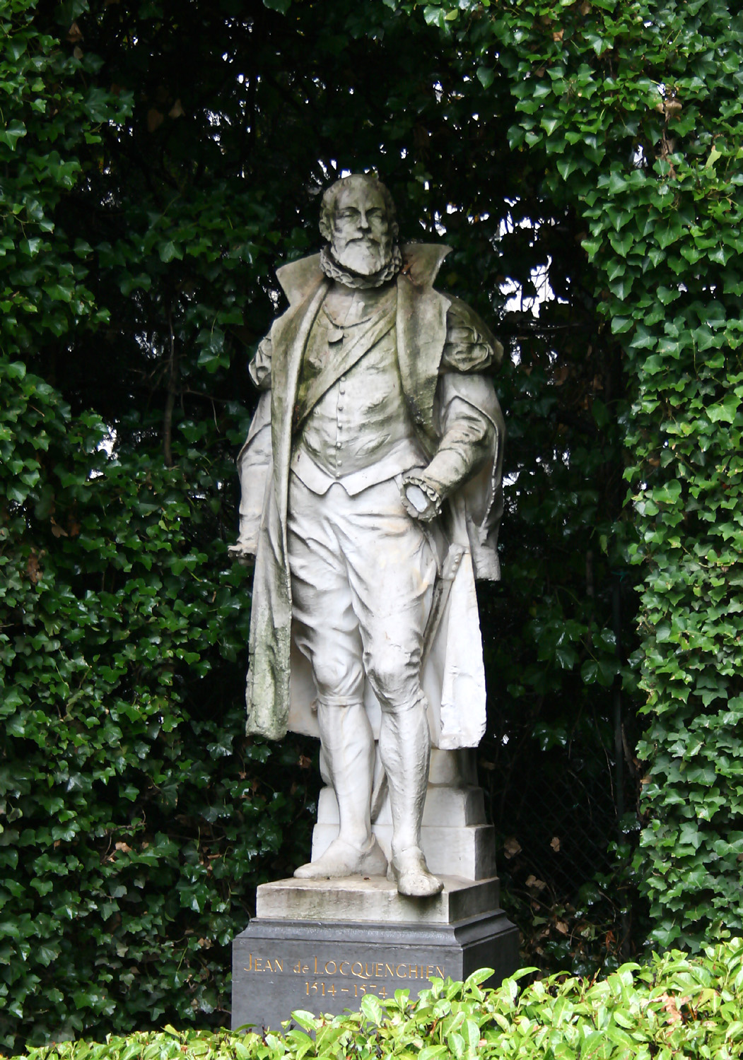 Jean de Locquenghien, Zavel, Brussels